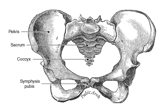 pubis